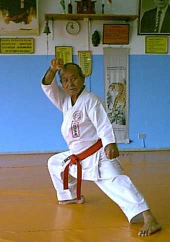 Maestro Yoshihide Shinzato realizando un Kata.